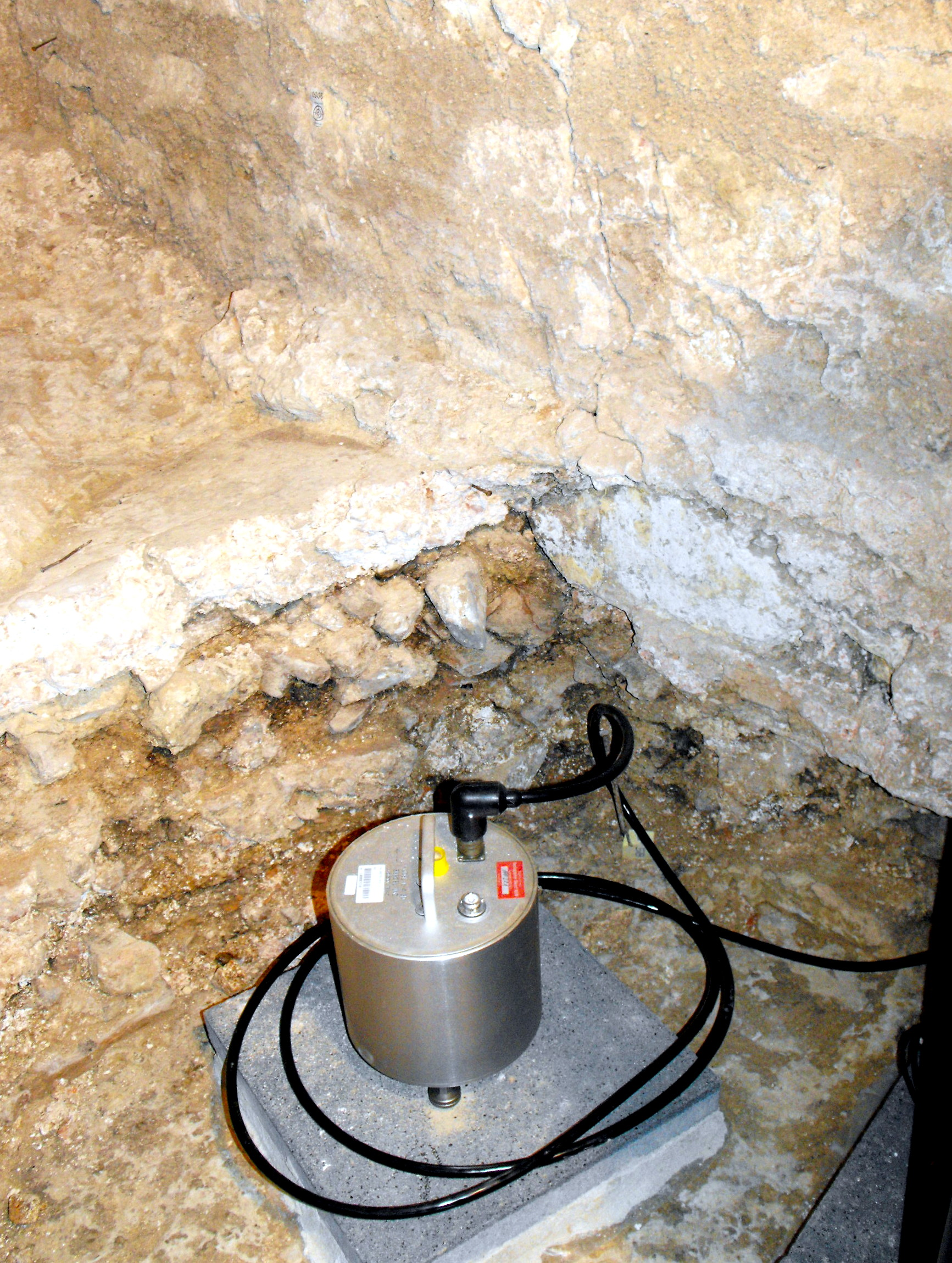 Seismometer am Aachener Dom